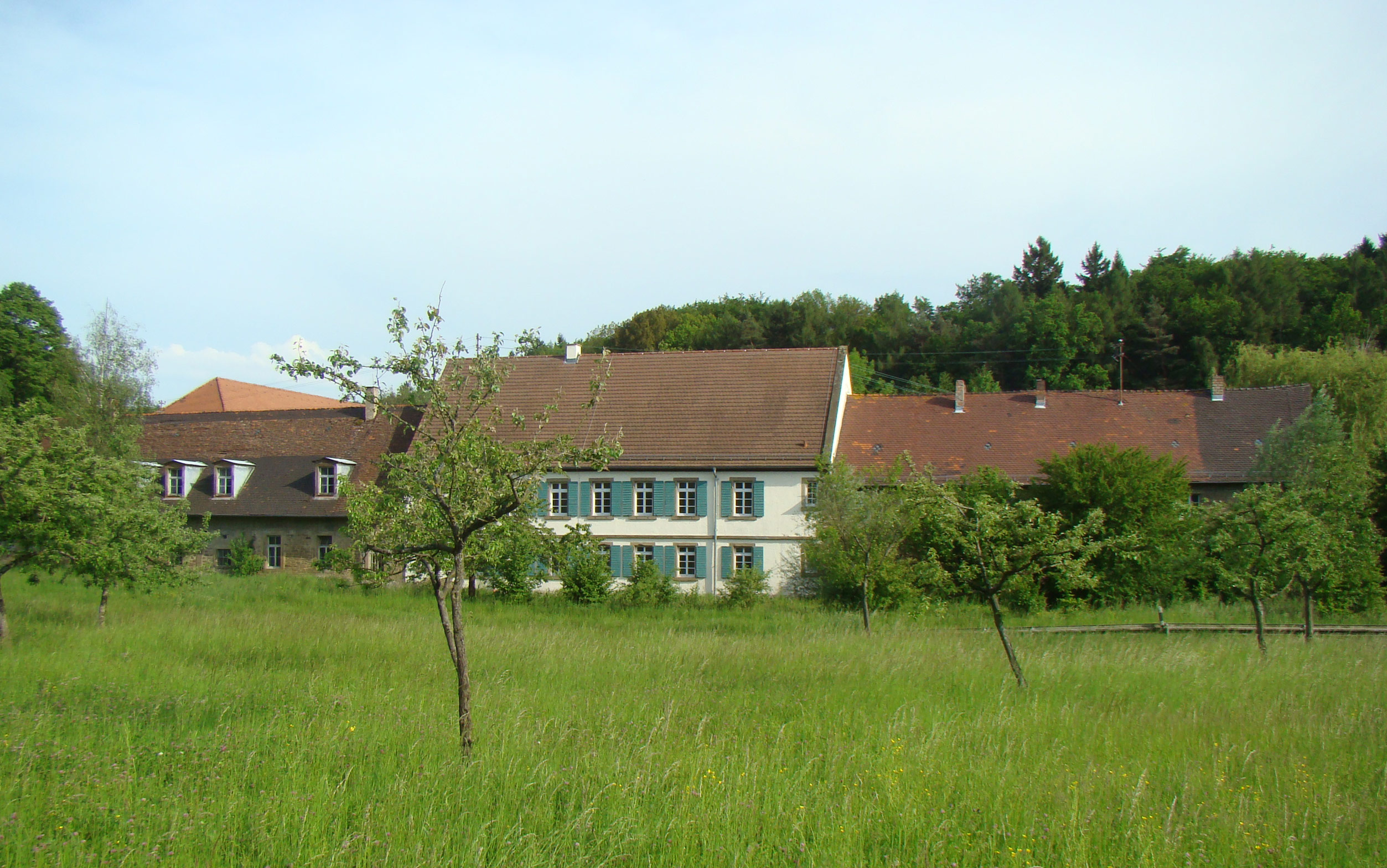 Stifterhof bei Östringen-Odenheim, bauliche Überreste des Klosters Odenheim